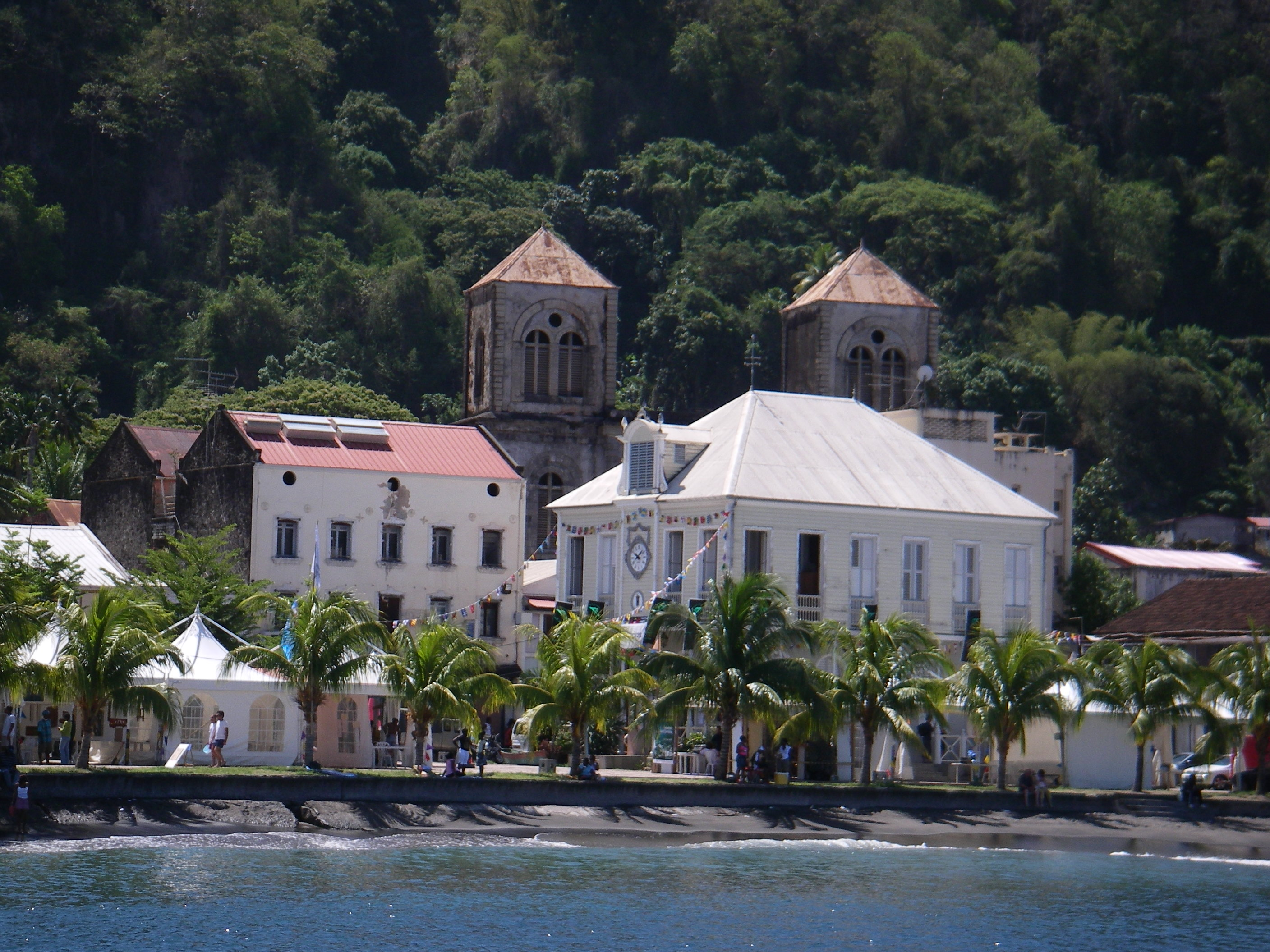 Nou kontan wè zòt Sin Piè